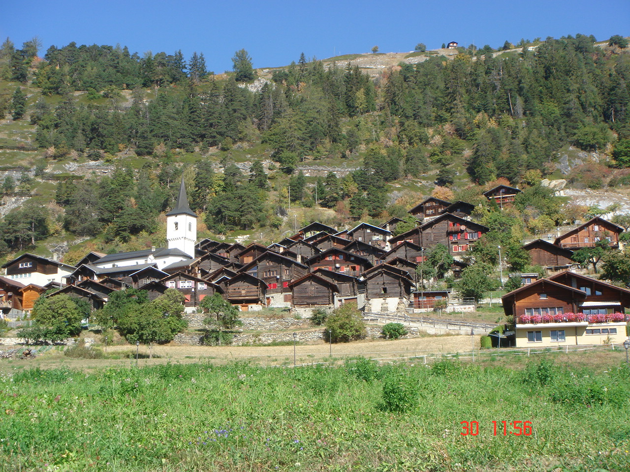 Vue de Erschmatt en Valais